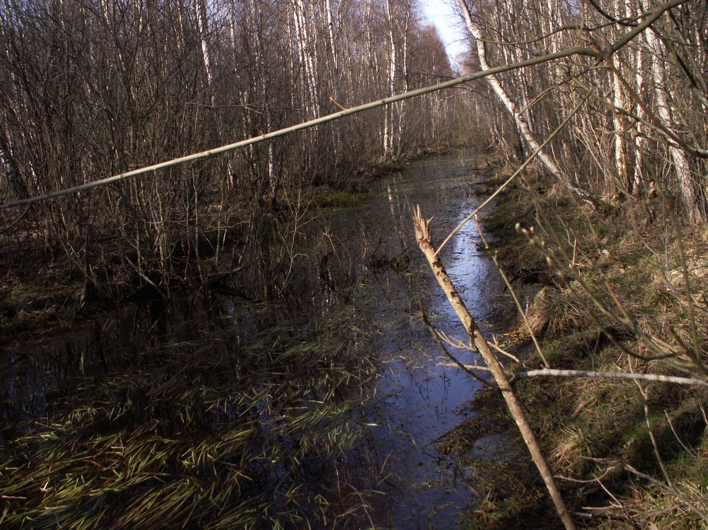 rivulet Luknė, Lithuania